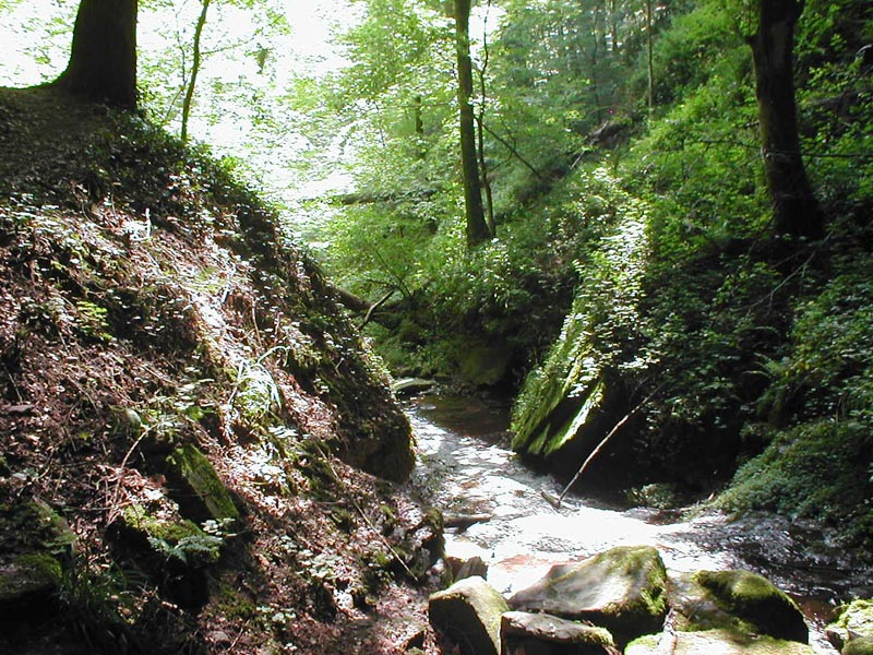 Wolfsschlucht bei Zwingenberg (Odenwald)